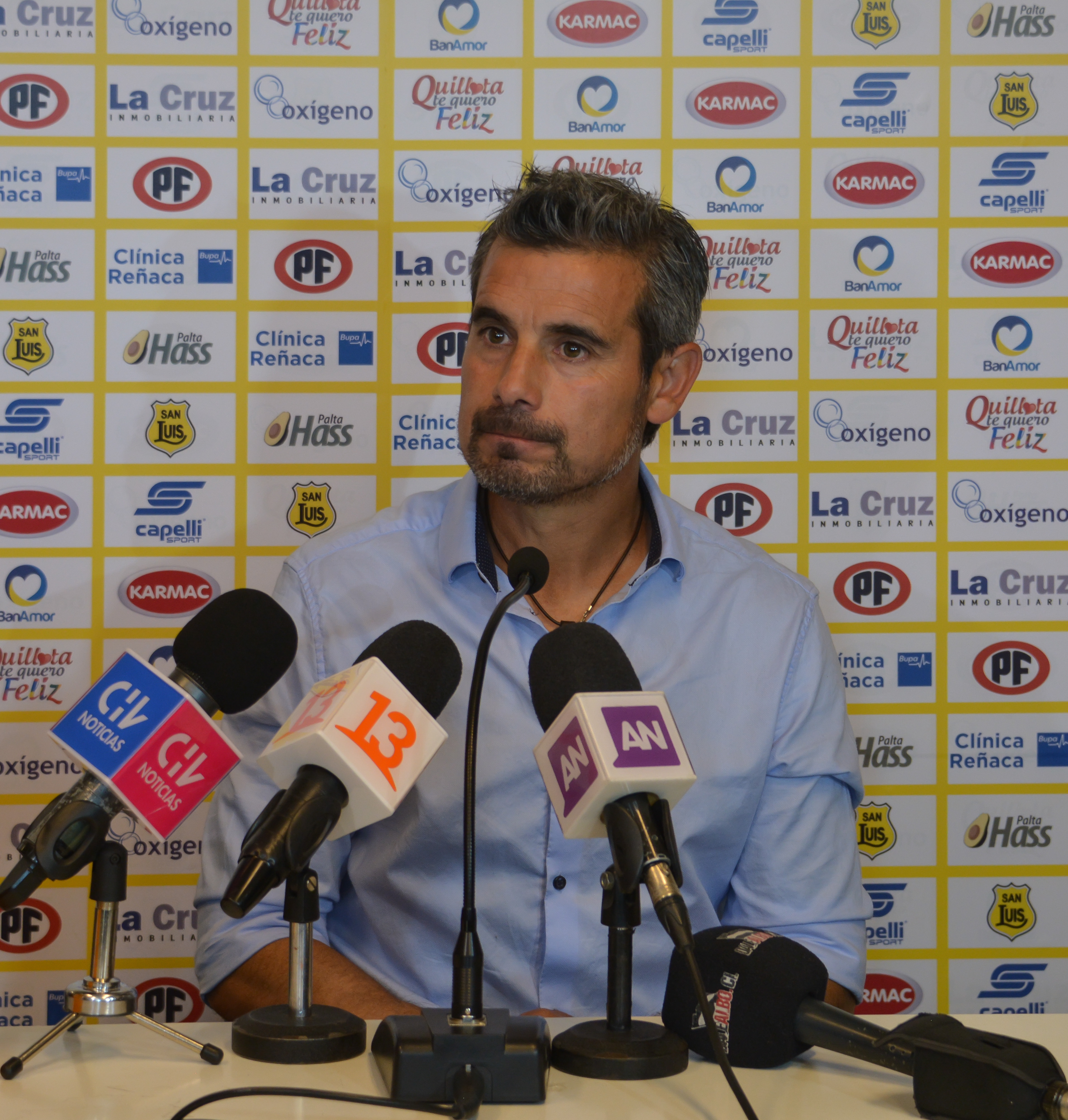 San Luis v Colo-Colo, Estadio Municipal Lucio Fariña Fernández, Quillota, Chile.